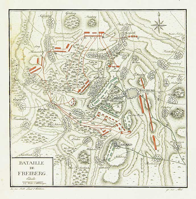 Схема битвы при Фрайберге